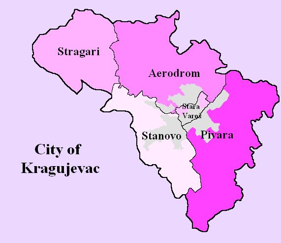 Maps of Kragujevac